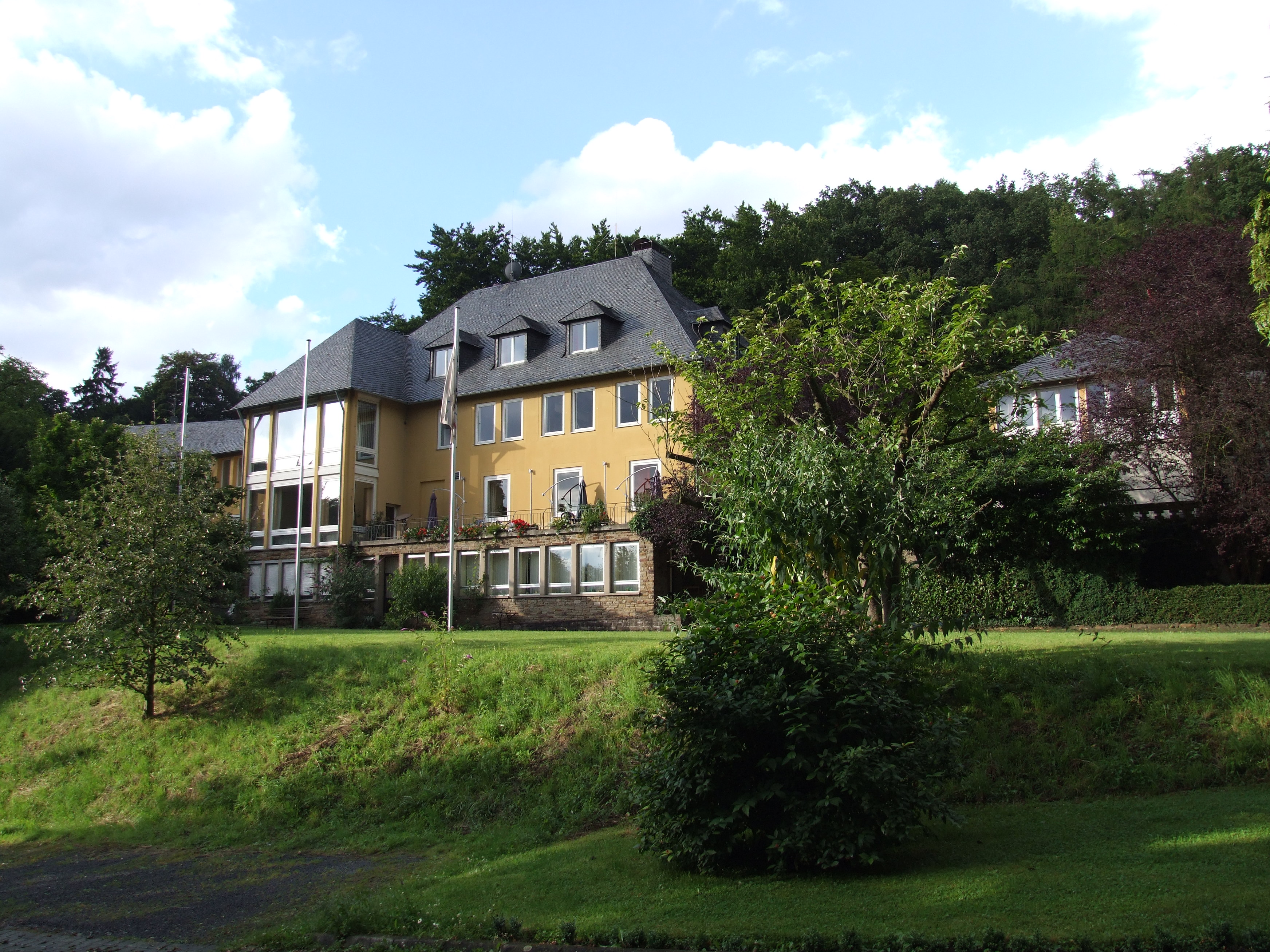 Haus Heisterberg, ehemaliger Jugendhof Rheinland (Fortbildungsstätte des Landschaftsverbandes Rheinland (LVR)) in Königswinter